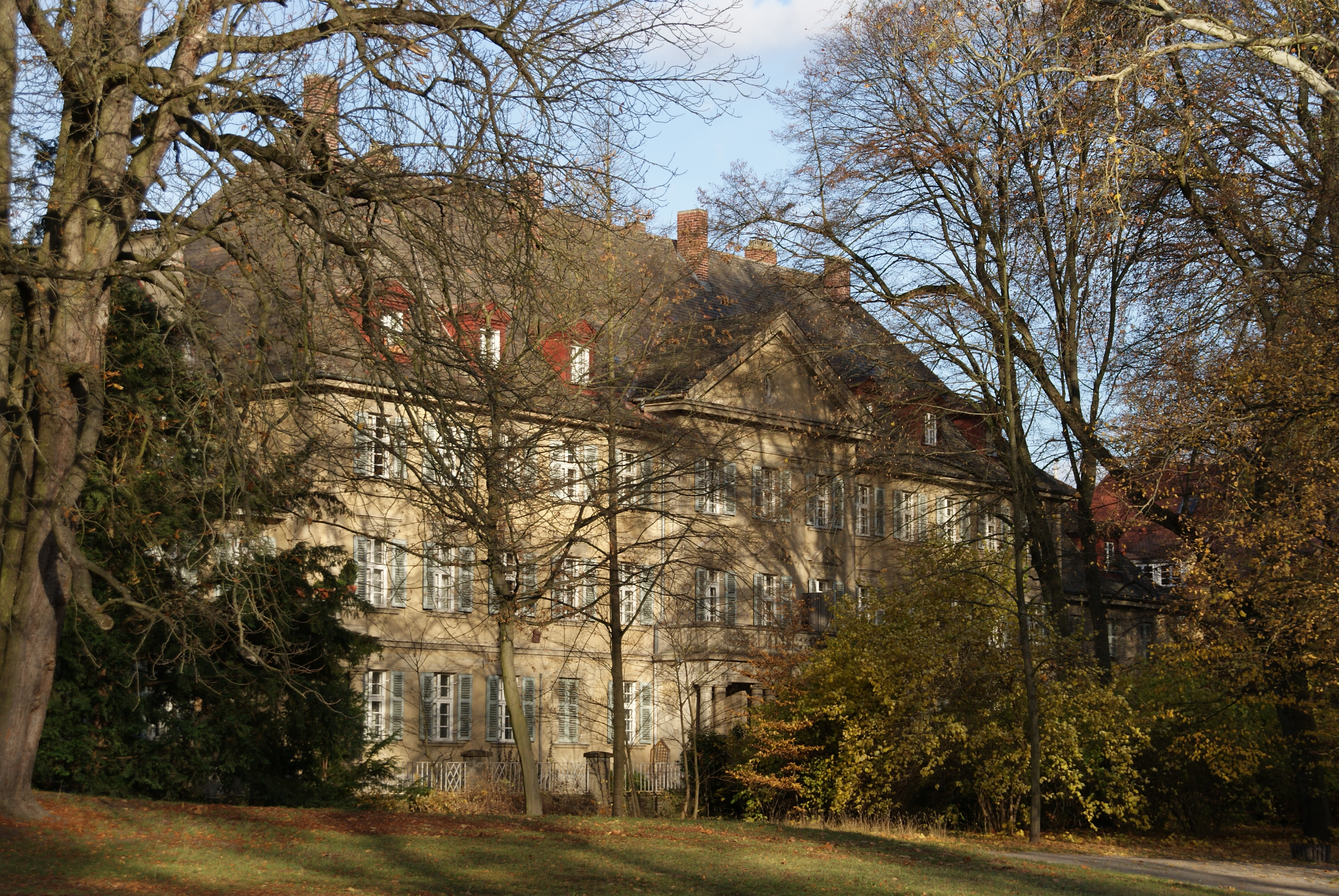 Wohn- und Geschäftshaus der Stadtbau-GmbH am Dörnberg-Park, schlossartiger Dreiflügelbau mit Walmdächern, dreigeschossiger Mittelbau mit übergiebeltem Mittelrisalit und Altanen auf Säulen, zweigeschossige Quertrakte, Neubarock und Neuklassizismus, 1924 von Carl Winkler; Nebengebäude (Wittelsbacherstraße 10), zweigeschossiger Walmdachbau mit einseitiger Mansarde, Zwerchhaus und Remisen, neubarock, gleichzeitig This is a photograph of an architectural monument.